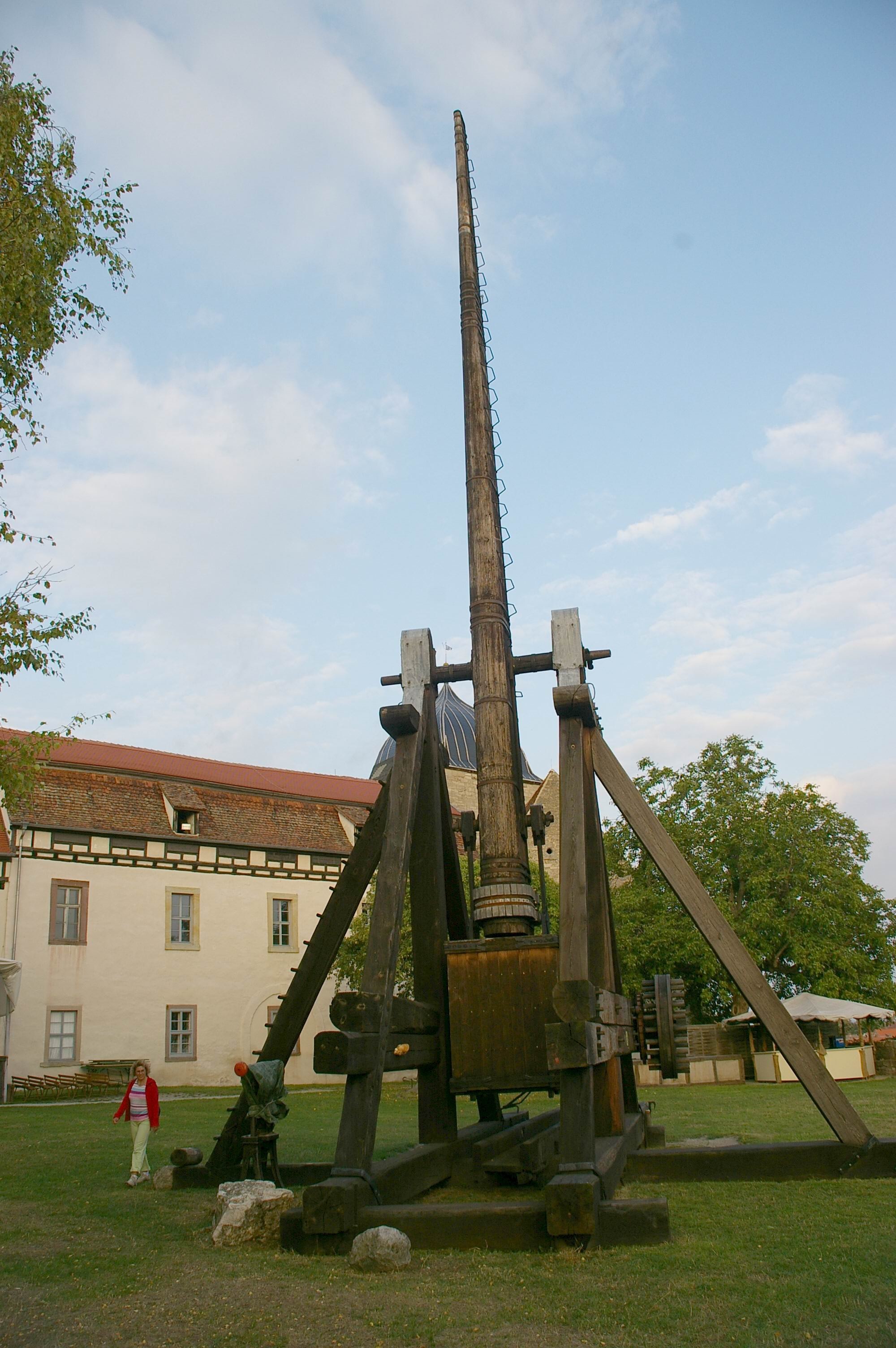 Steinschleuder auf der Runneburg in Weißensee (Thüringen)